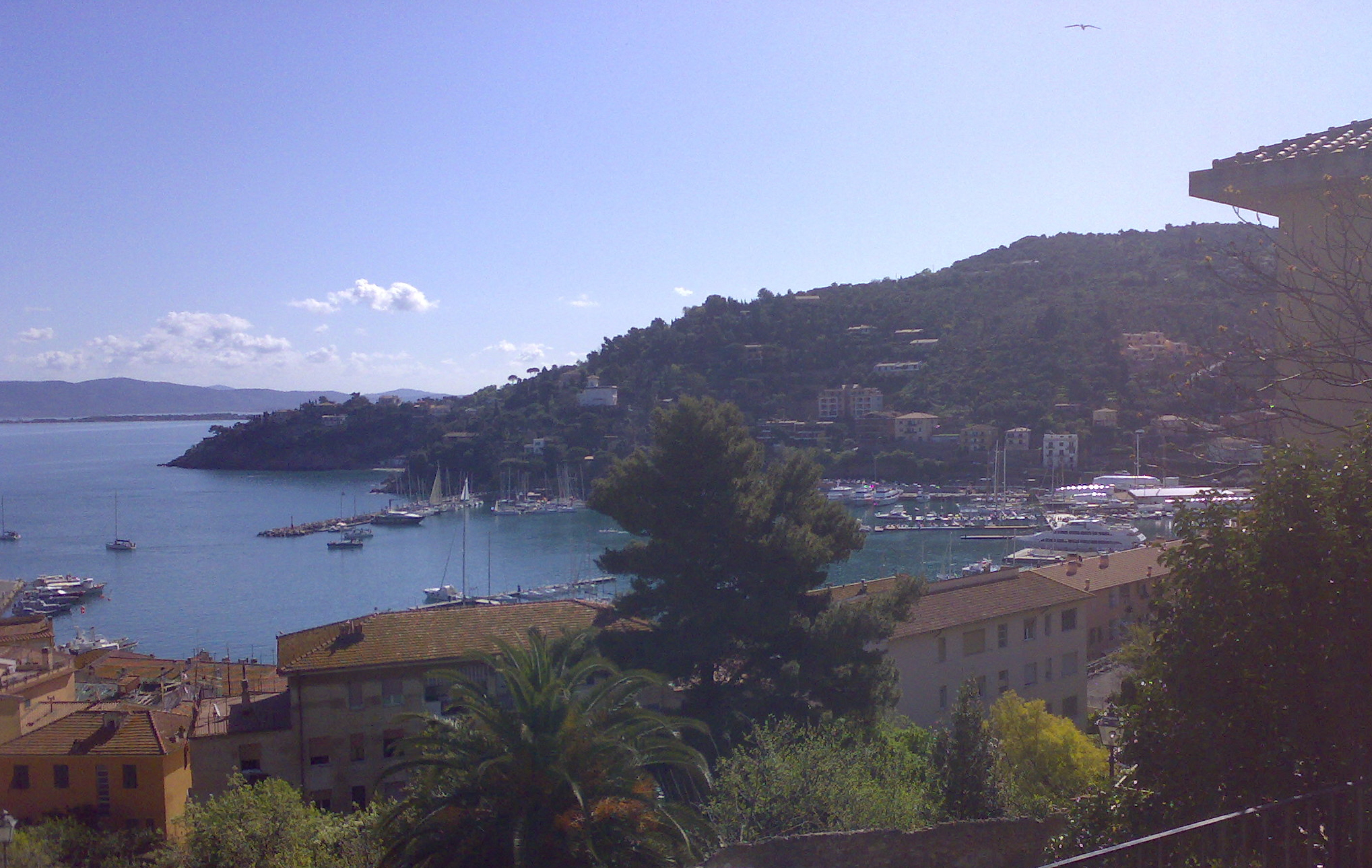 Panorama del porto principale di Porto S.Stefano dalla strada panoramica.